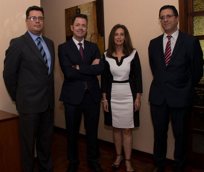 Equipo multidisciplinar